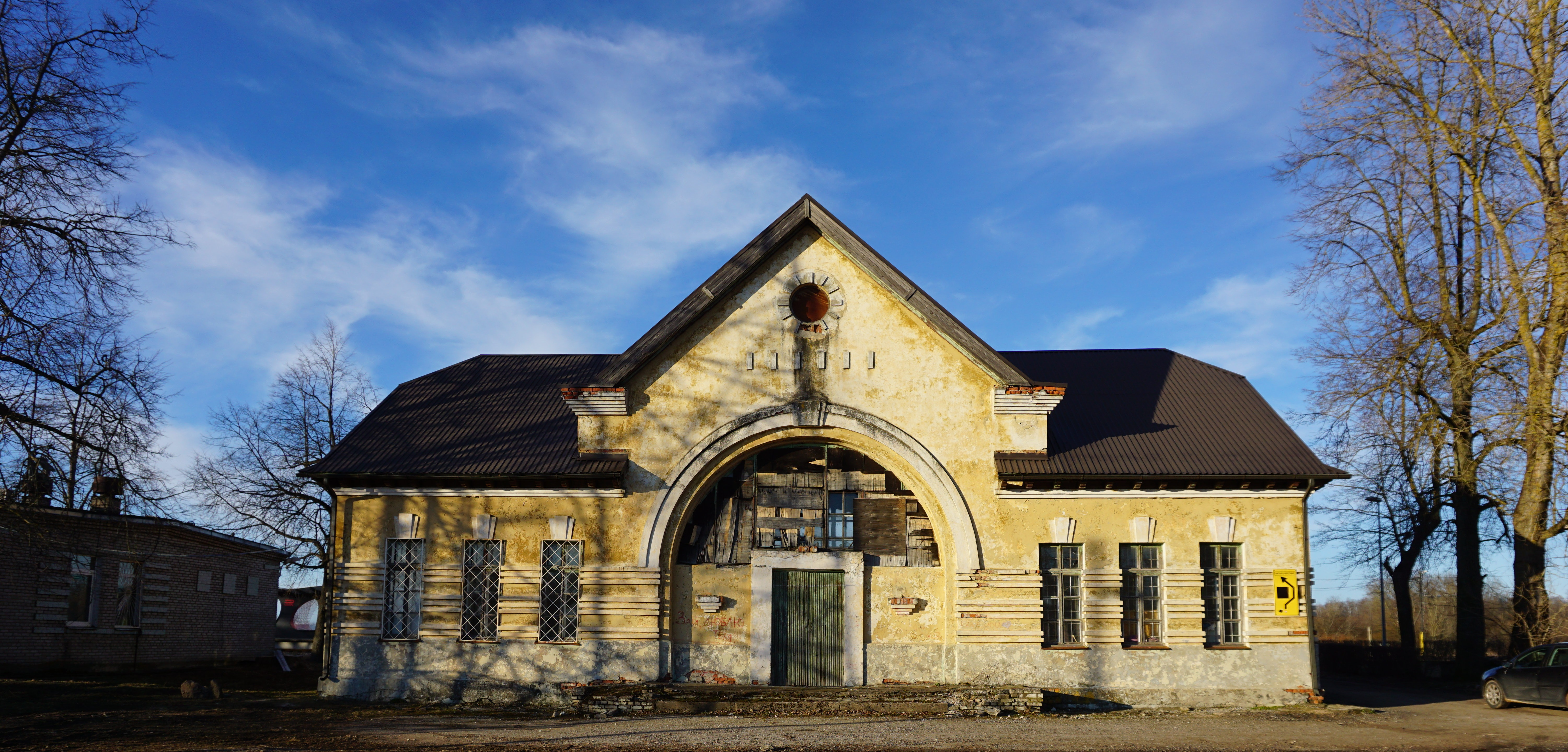 1950. aastatel rajatud Vaivara stalinistlik kivist jaamahoone on analoogne Sonda jaamahoonega.